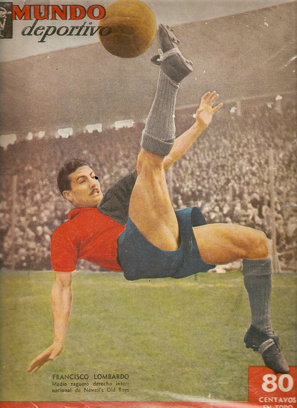 Lombardo, Medio zaguero derecho internacional de Newell's Old Boys